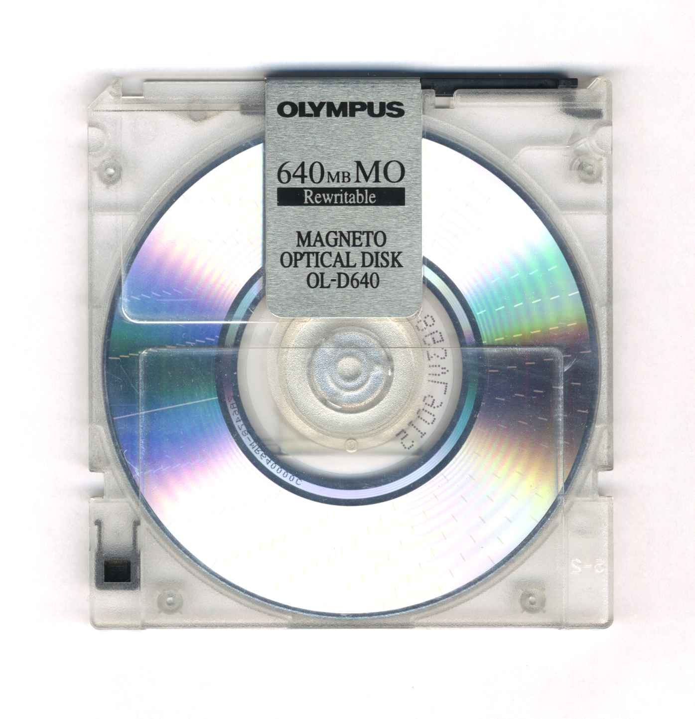 Disco magneto-óptico A Magneto-optical-disc. Public Domain, I take this photo myself, ocrho.